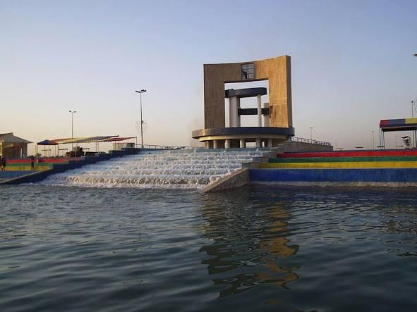 نافورة بحيرة الجادرية - محافظة بغداد